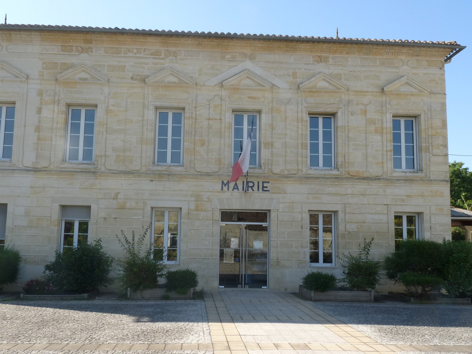 Mairie, Sablons, Gironde, France